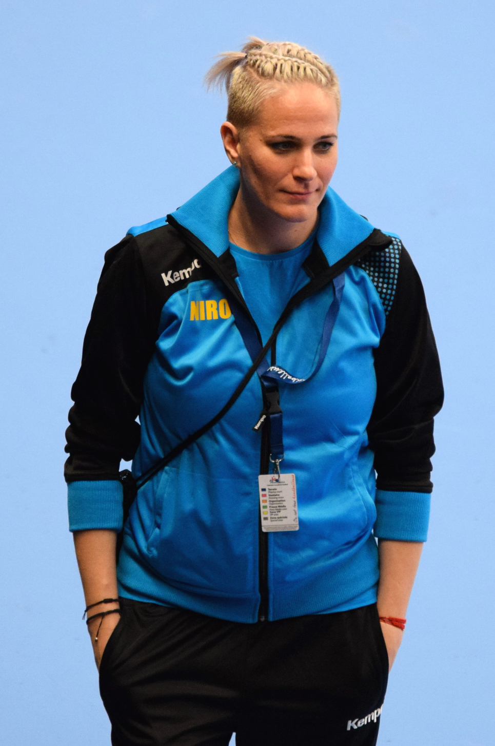 Paula Ungureanu, le 29 novembre 2015, lors du match Roumanie-Cuba, pour le compte du TIPIFF 2015. Au stade Pierre de Coubertin, à Paris.